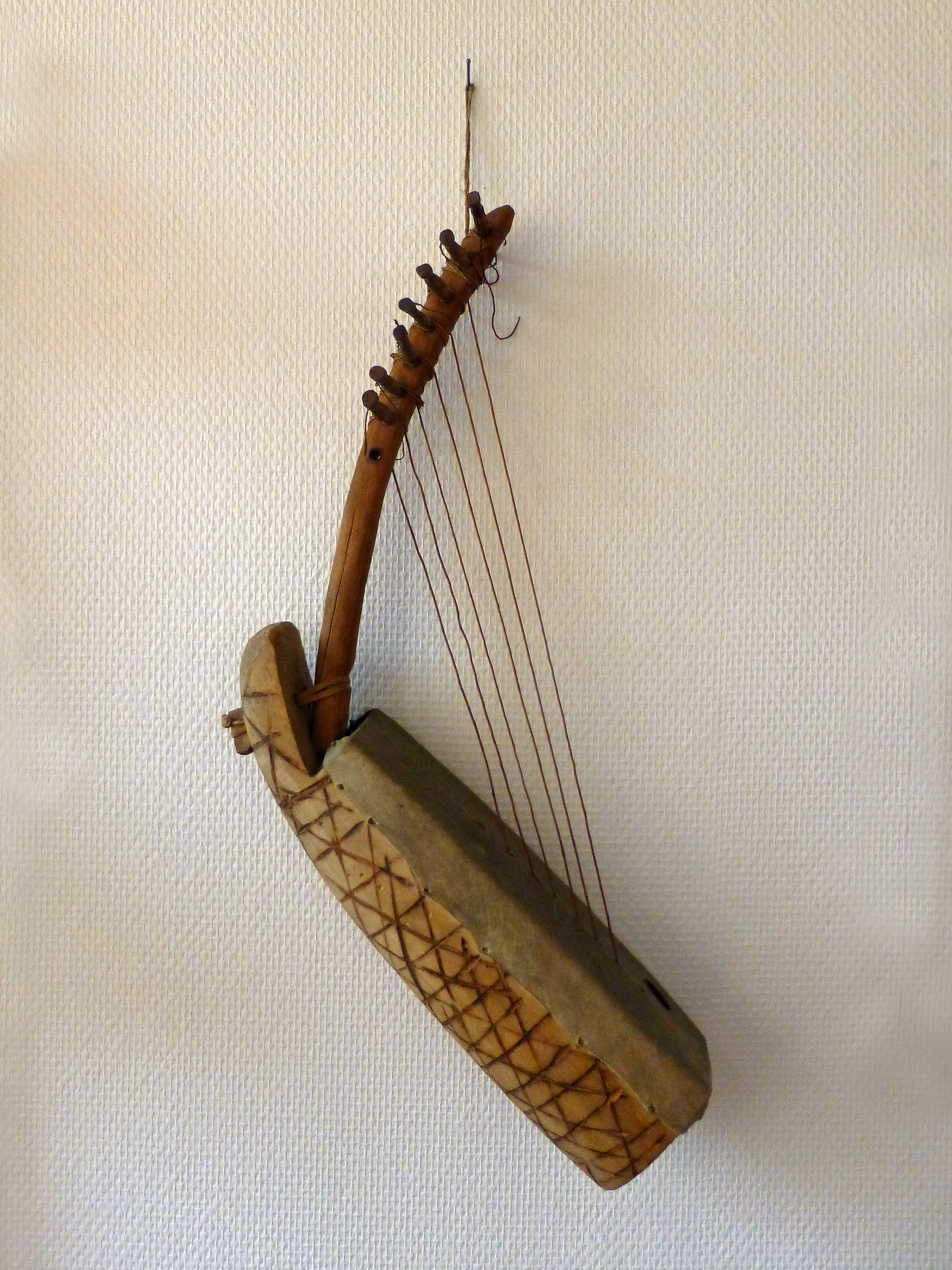 Musée africain de Gunsbach (Haut-Rhin) : ngombi